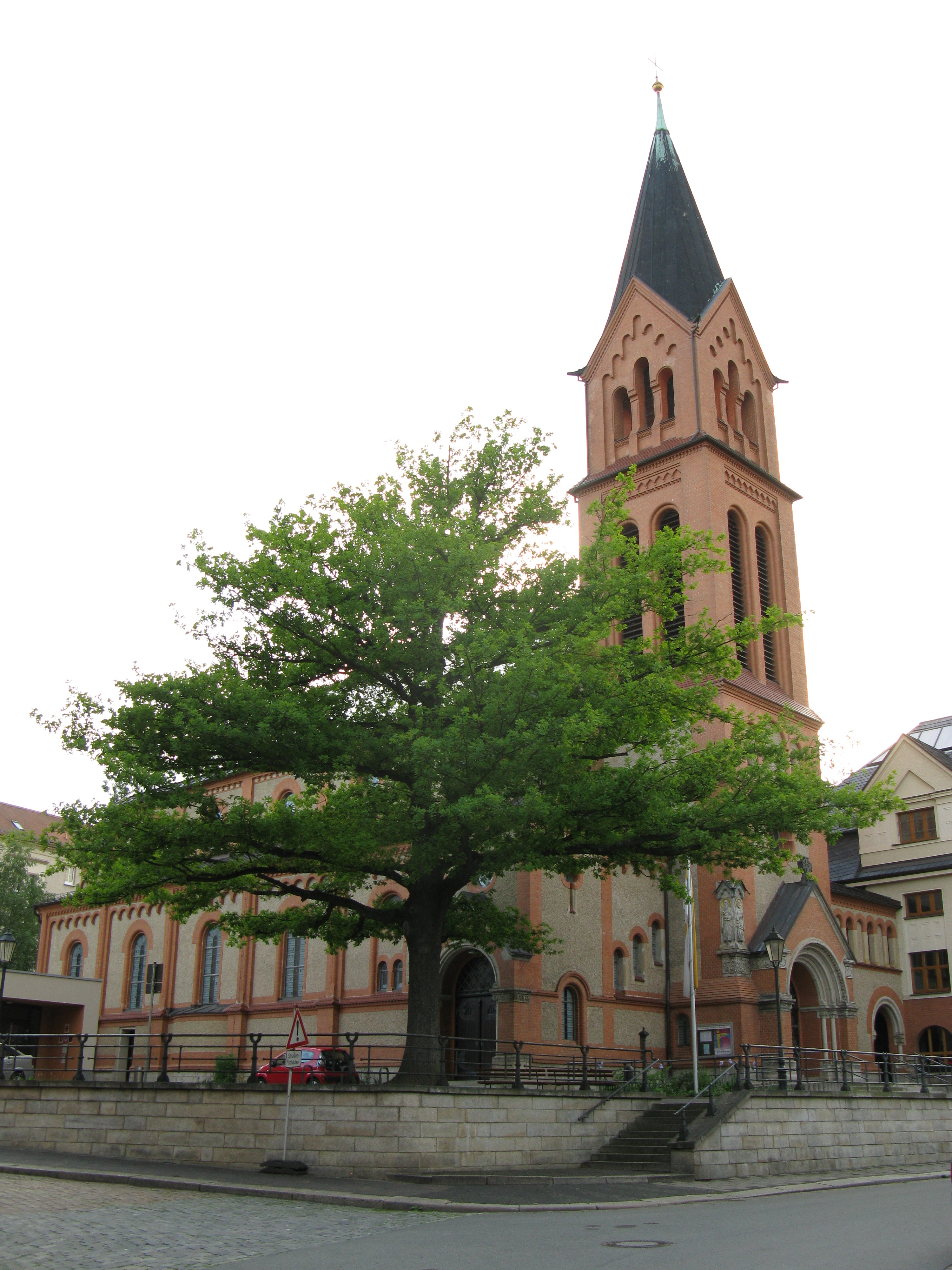 Plauen, denkmalgeschütztes Herz-Jesu-Kirche in der Gustav-Adolf-Straße (Gustav-Adolf-Straße 33).